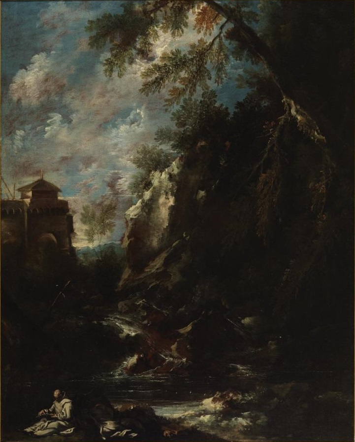 La obra representa a un monje de la Orden de los Cartujos leyendo en un bosque.